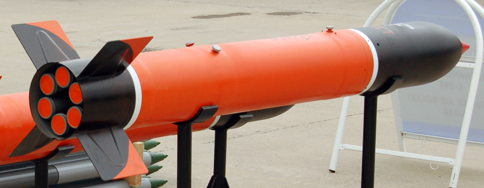 НАР С-24Б, вид сзади, на МАКС-2009